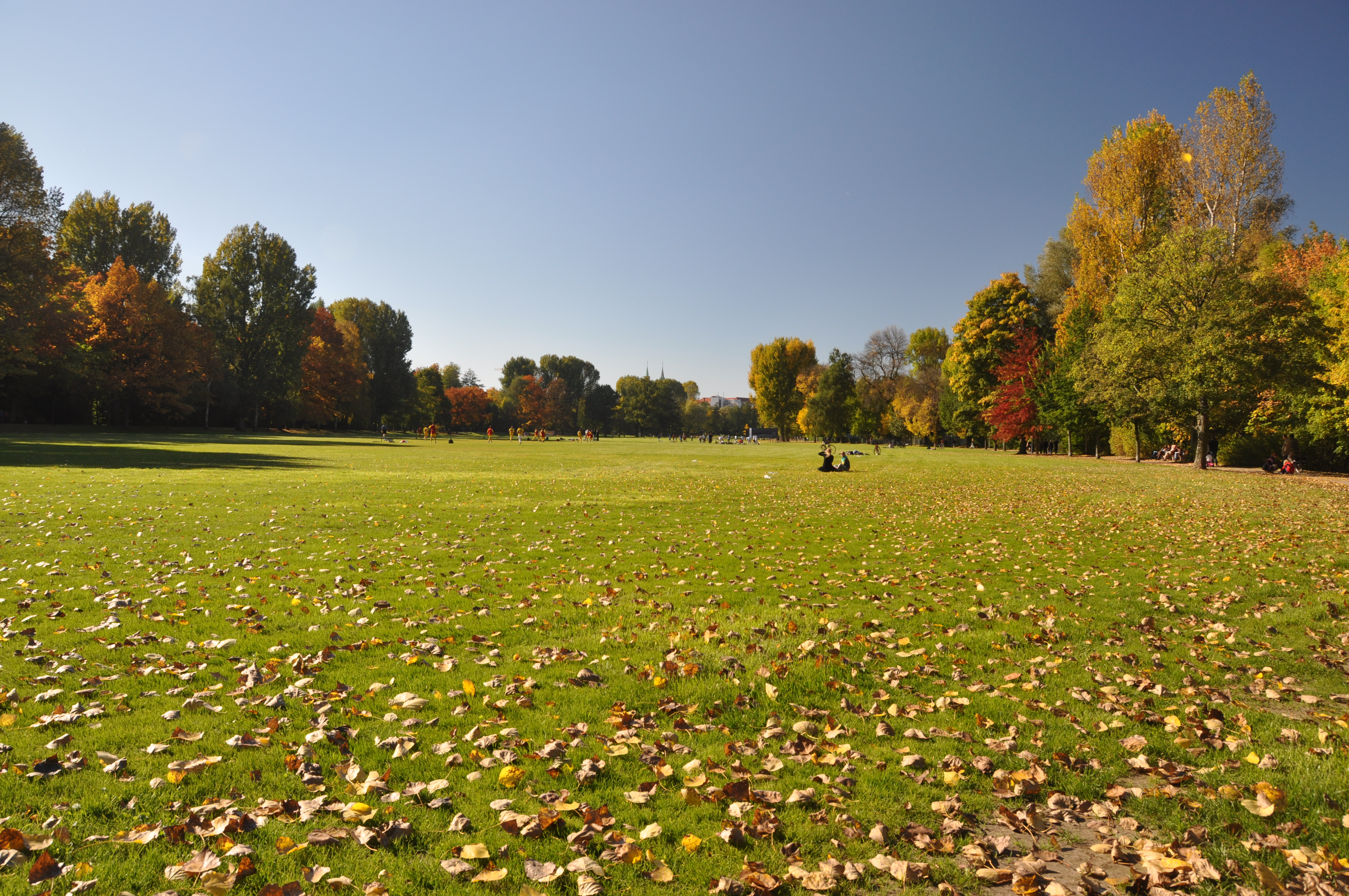 Woehrder Wiese